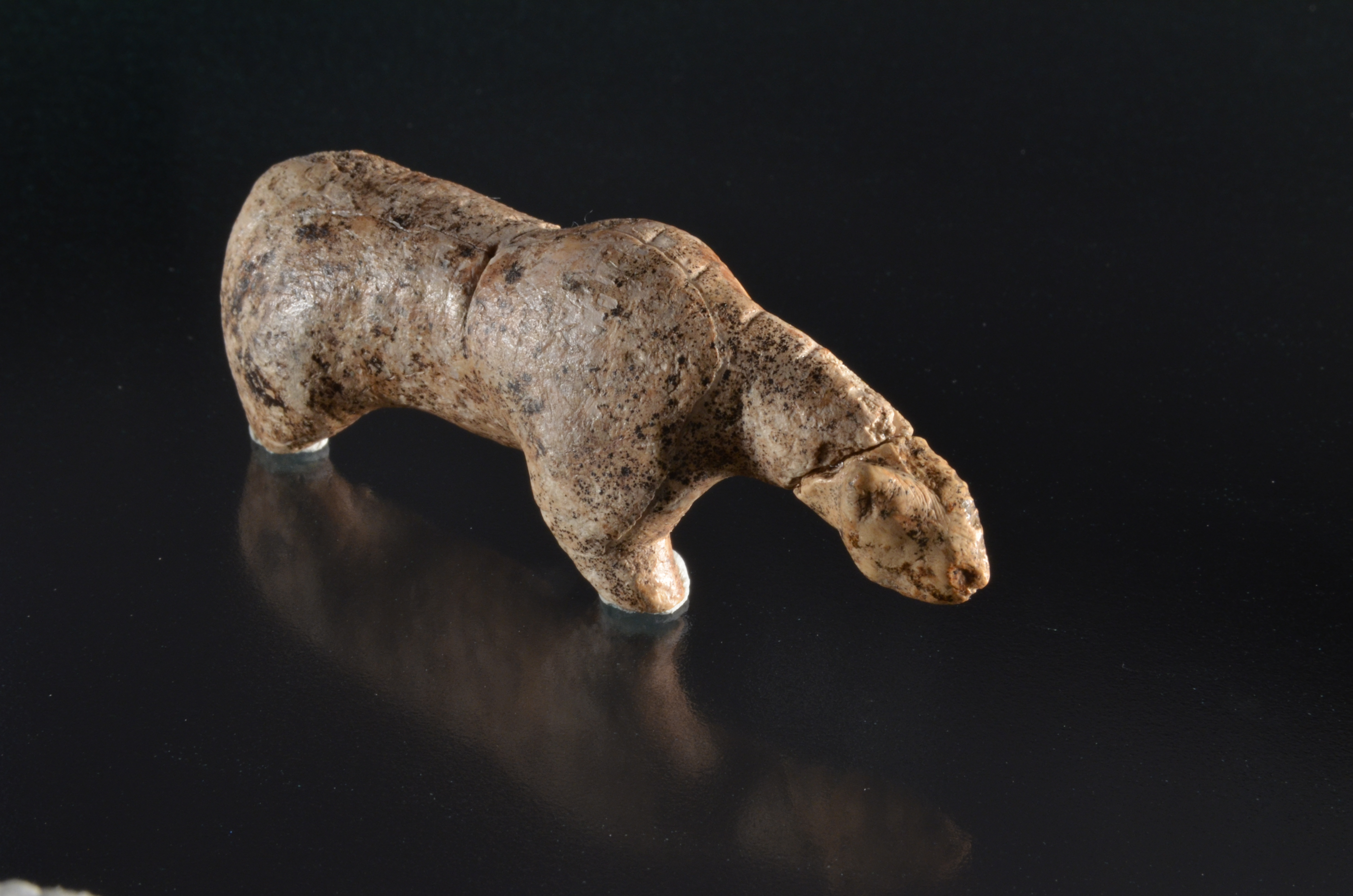 Löwenfigur mit Kopf